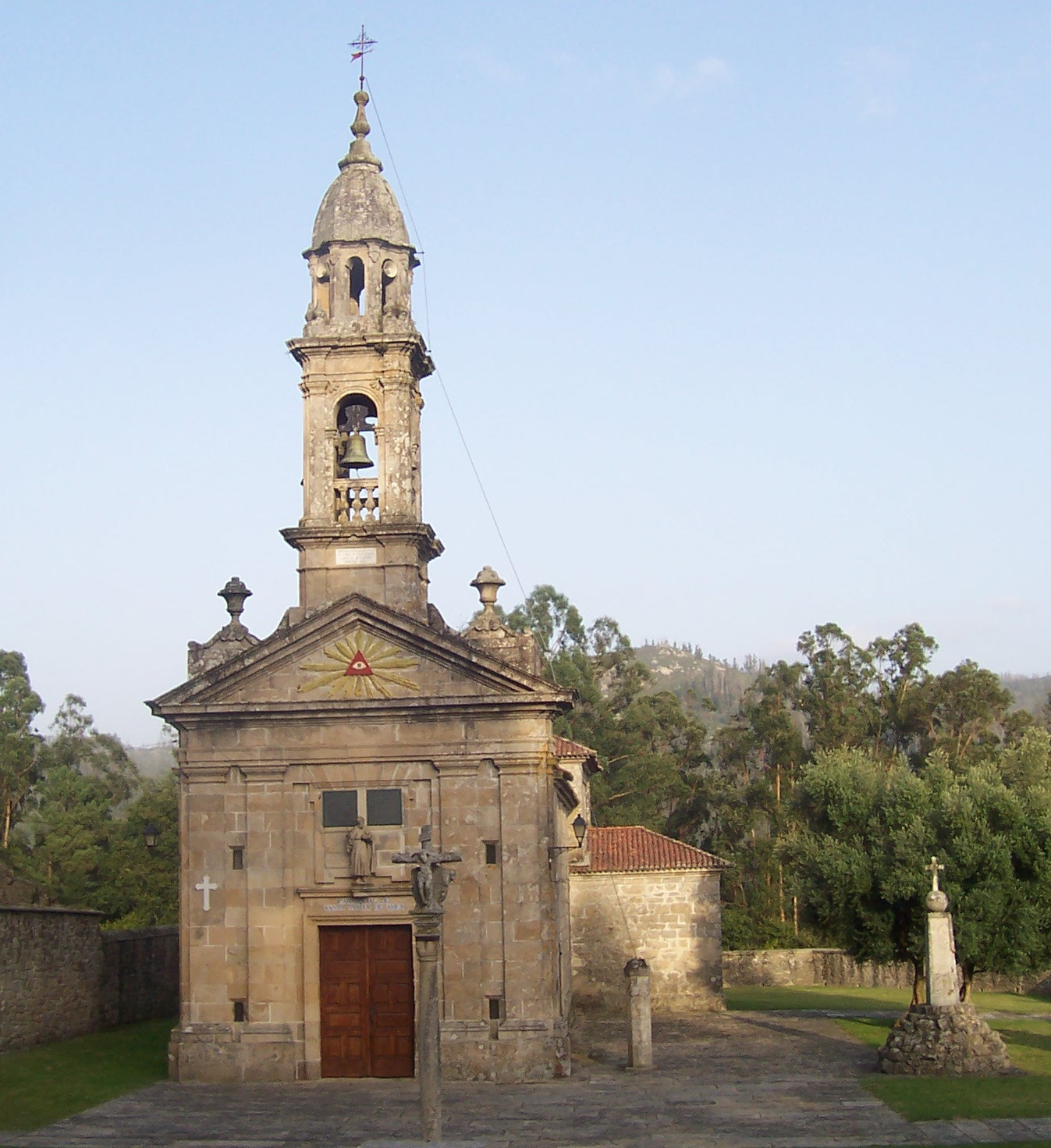 Igrexa de San Tomé de Ames, Ames